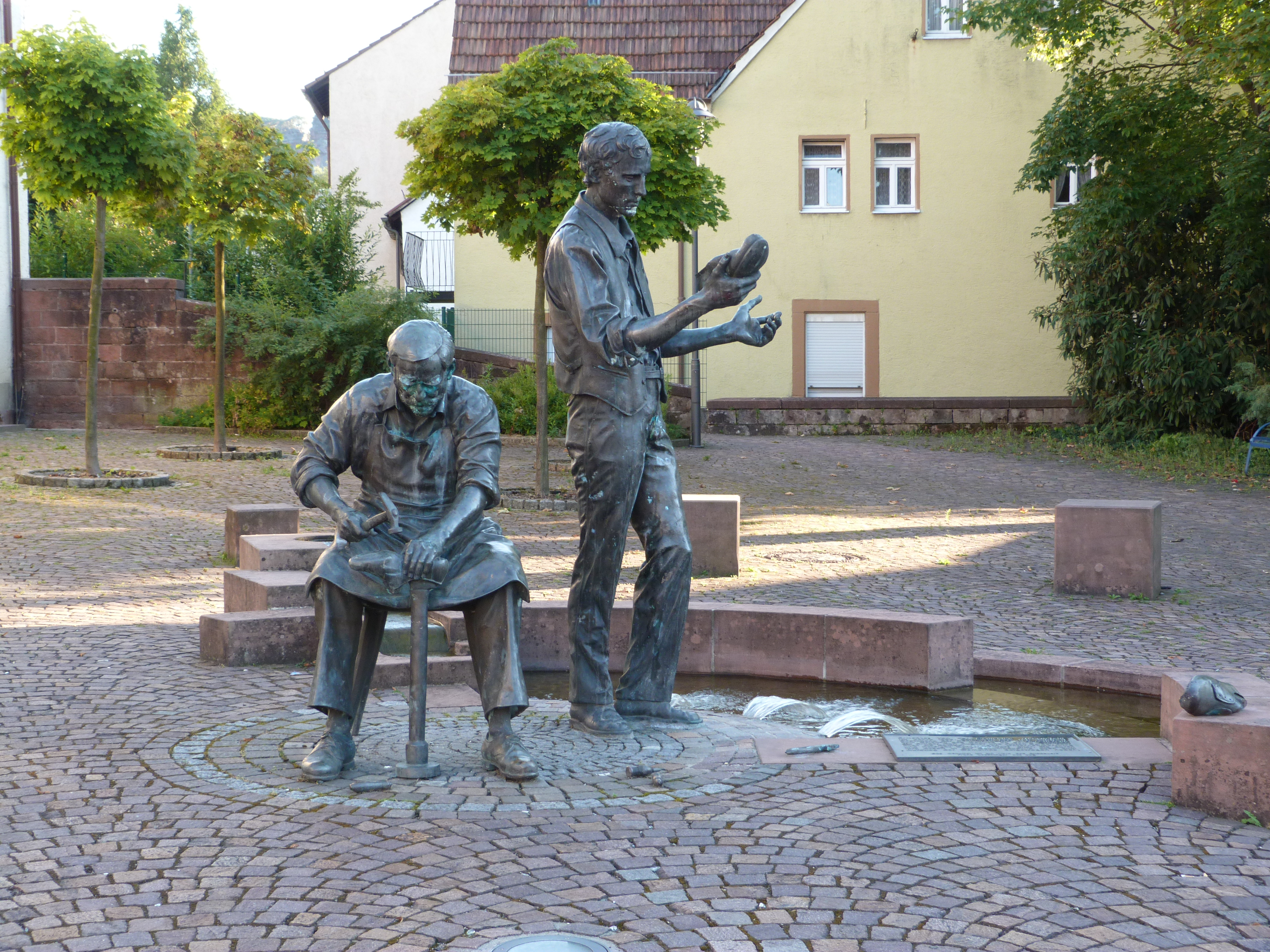 Schuhmacherdenkmal auf dem Lorenz-Wingerter-Platz in Hauenstein, errichtet anlässlich des Jubiläums "100 Jahre Schuhindustrie in Hauenstein" im Jahr 1986. Aufnahme vom 09.07.2011.